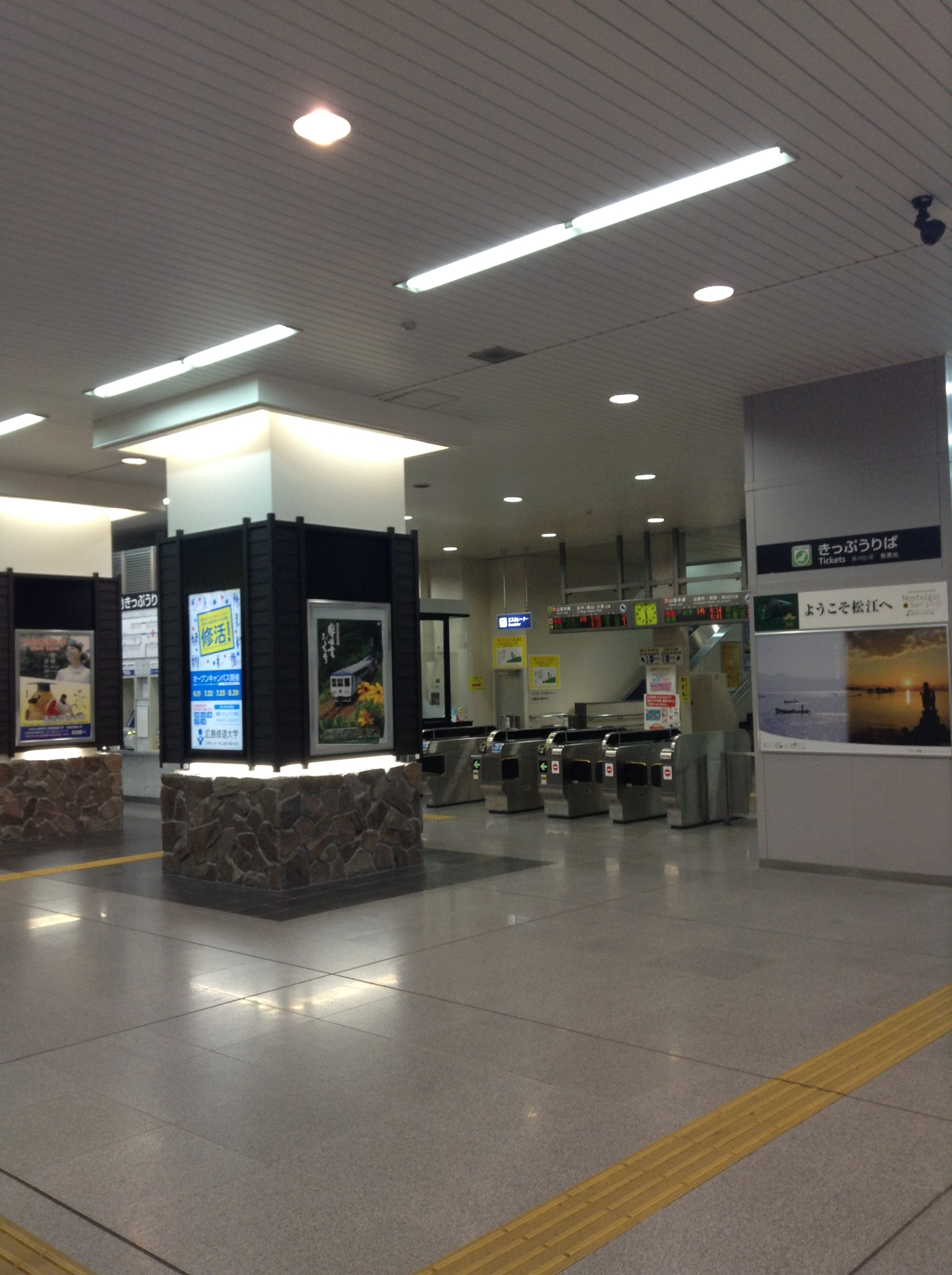 松江駅の改札口2017年(平成29年)7月22日